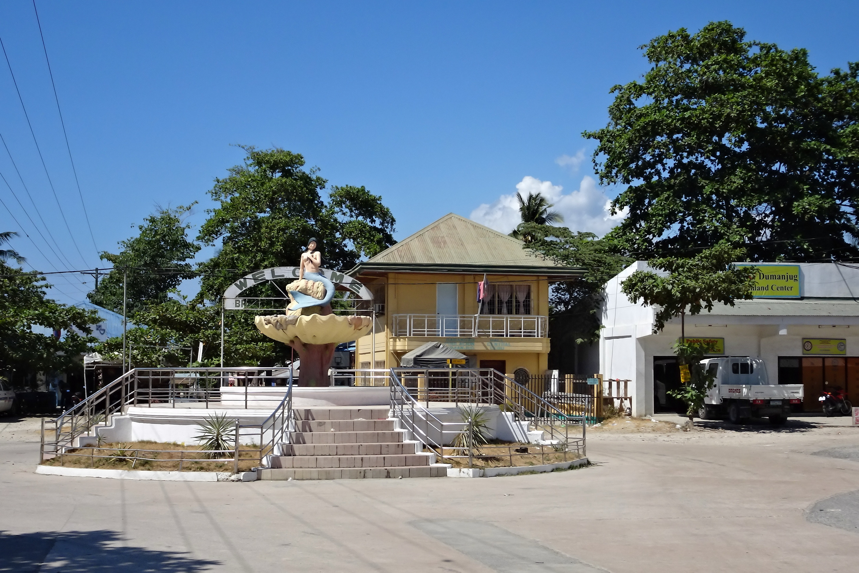 Dumanjug, Cebu, Philippines